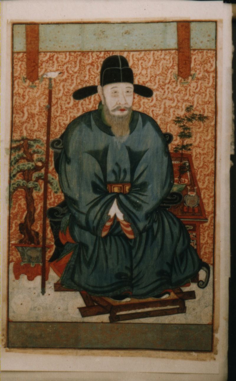 中文（香港）: 領議政河演夫婦影幀